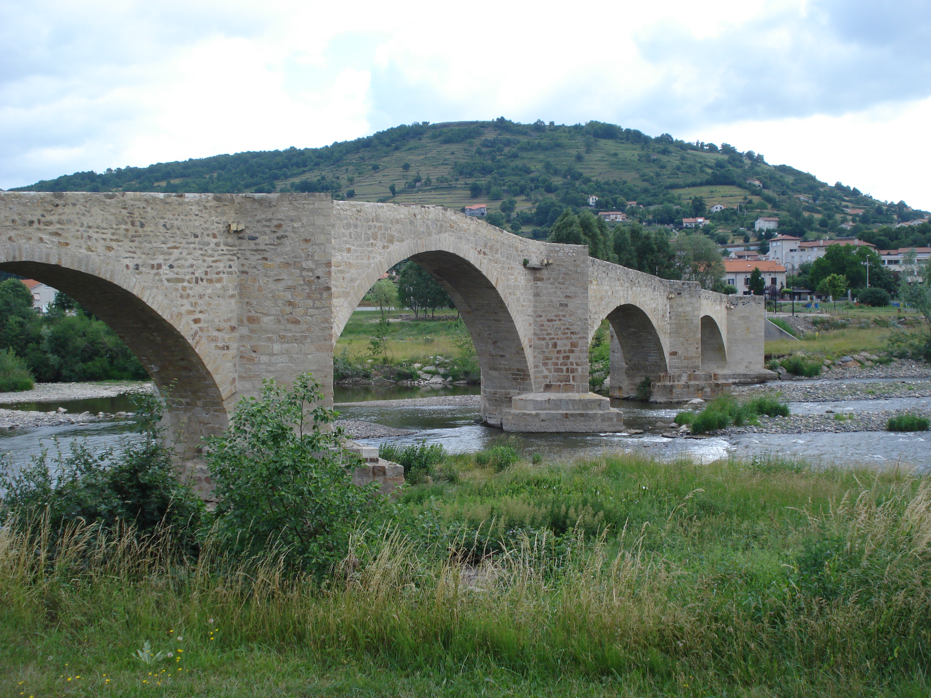 Brives-Charensac, la Loire avec son vieux pont